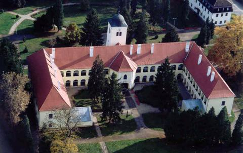 Csákánzdoroszló - palace, Hunagry, aerialphotography